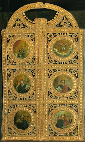 Царскія вароты Museum of Belarusian Folk Art Native nameМузей беларускага народнага мастацтваLocationMinsk district, BelarusCoordinates54° 03′ 36″ N, 27° 44′ 22″ E Established1979Website